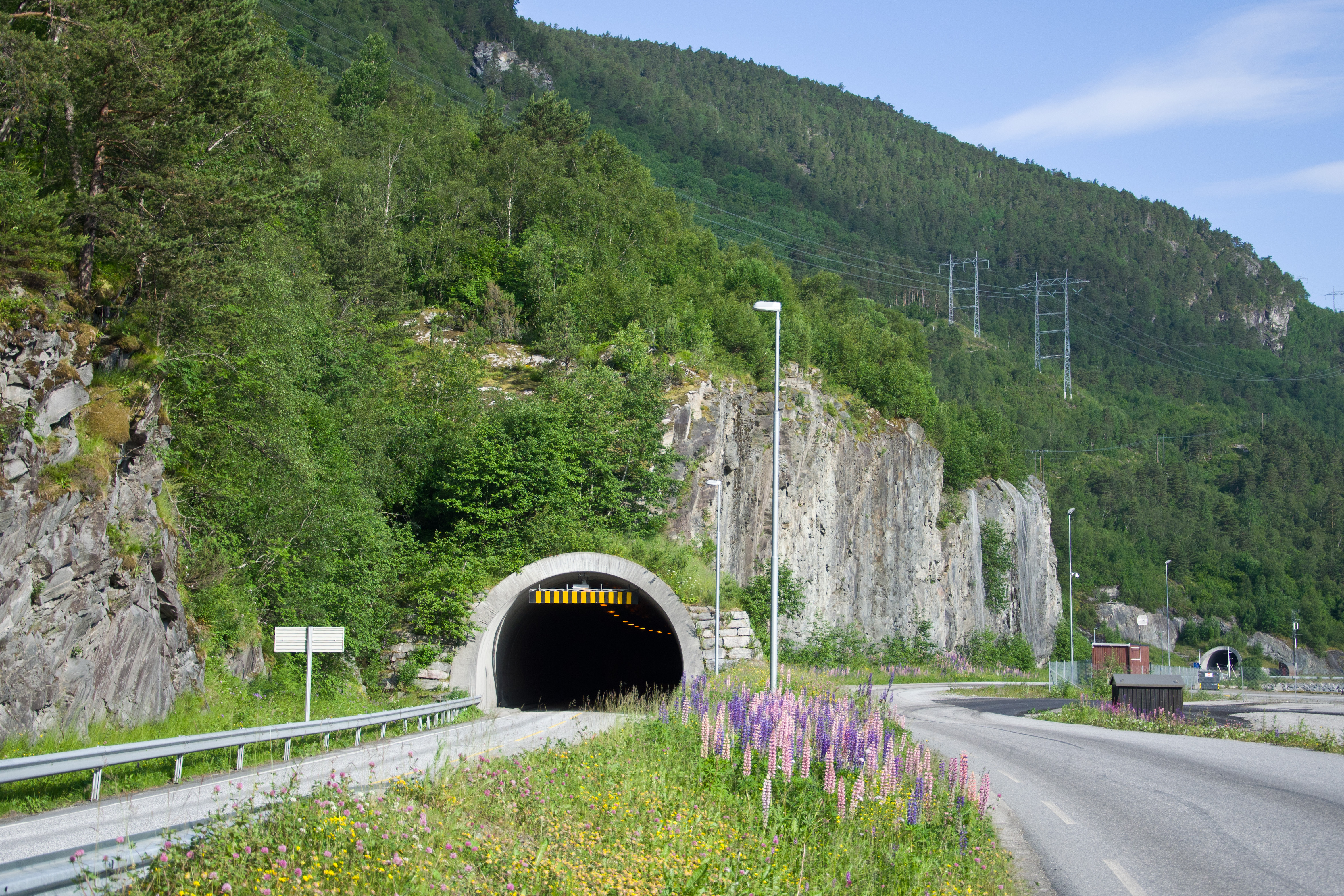 Hammartunnelens sørøstre innslag, fylkesvei 62 i Sunndal, Møre og Romsdal. Øksendalstunnelen skimtes i bakgrunnen.